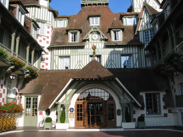 Hotel Normandy Barrière de Deauville